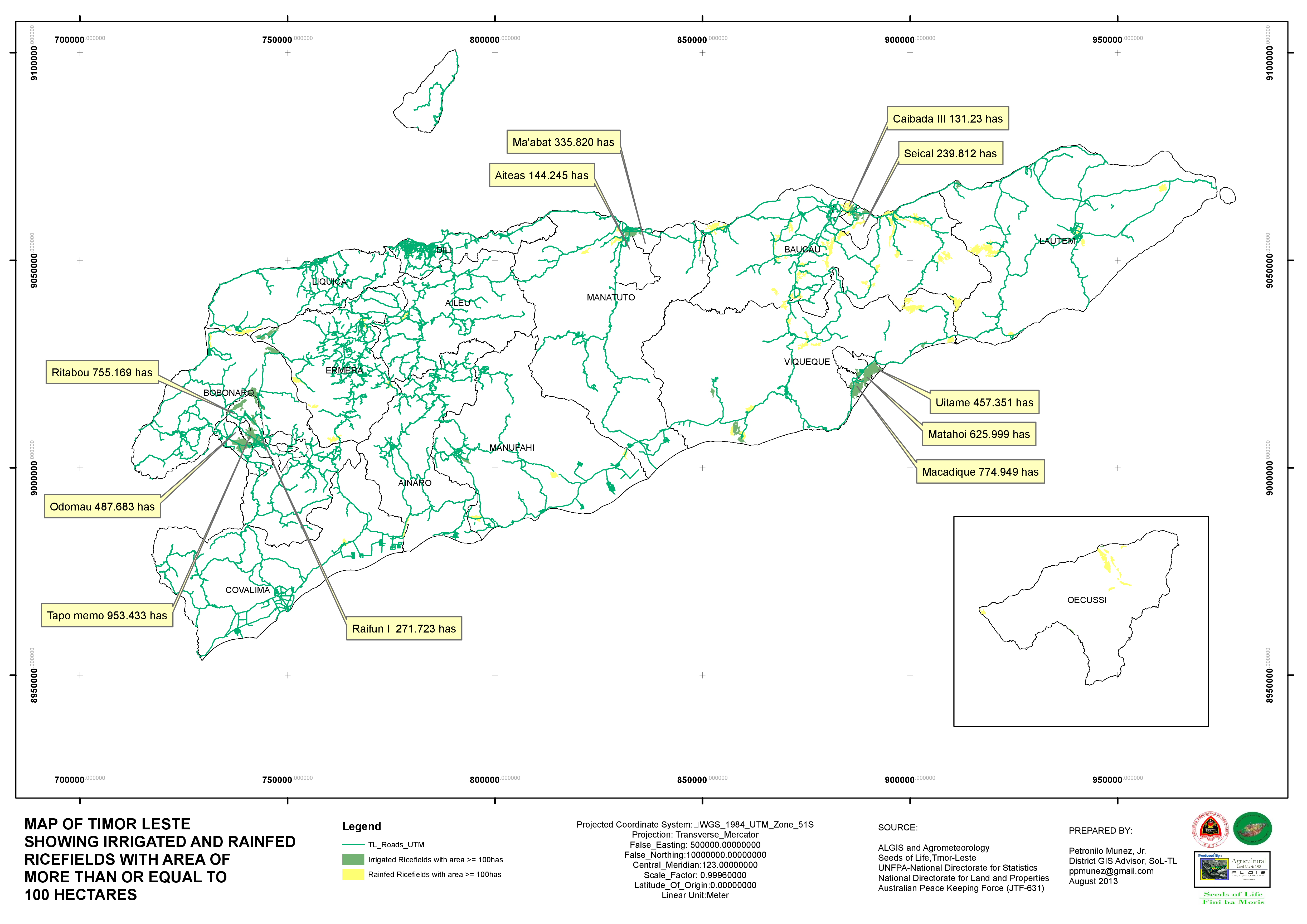 Reisfelder in Osttimor